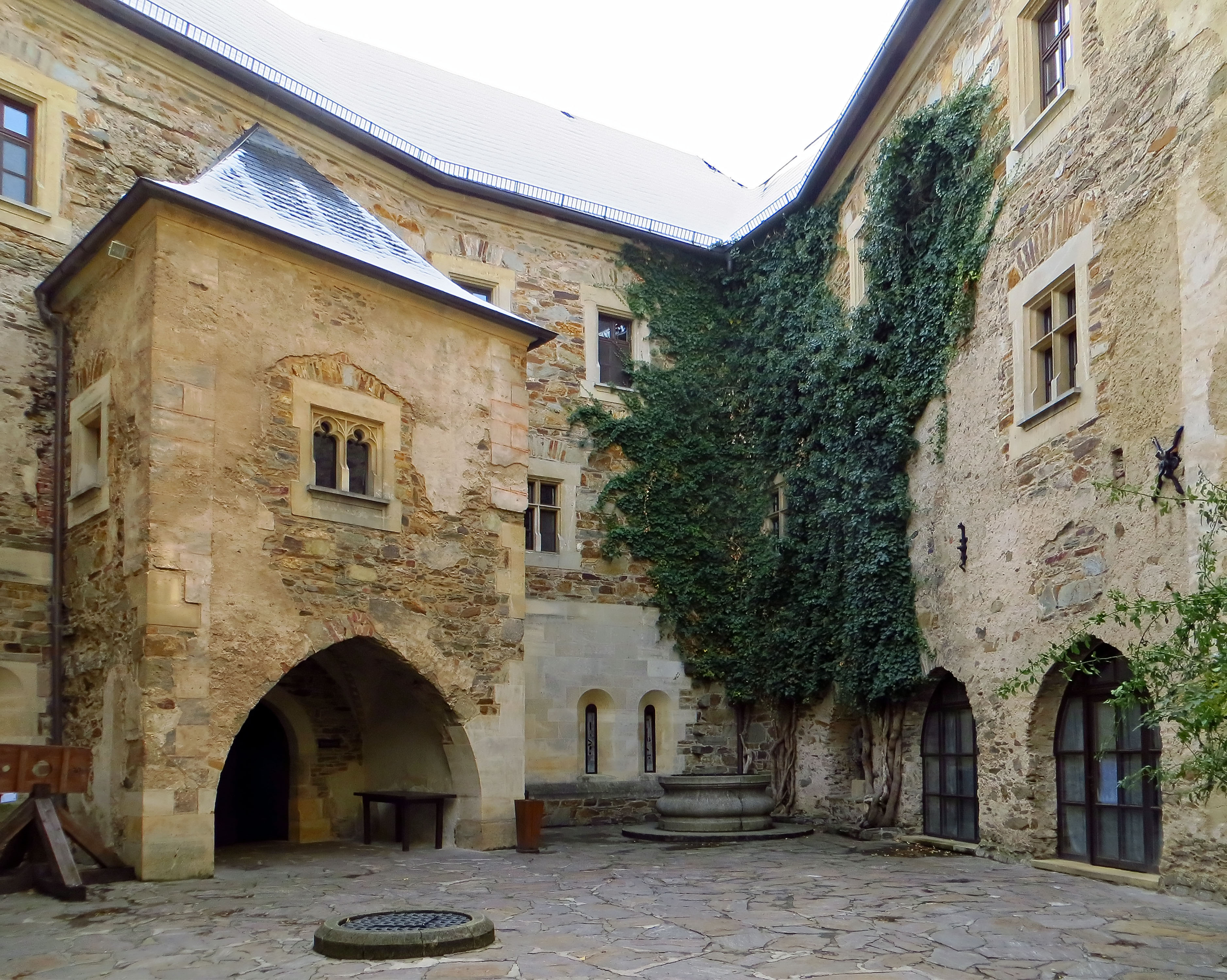 Burg Lockenhaus